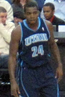 Paul Millsap of Utah Jazz